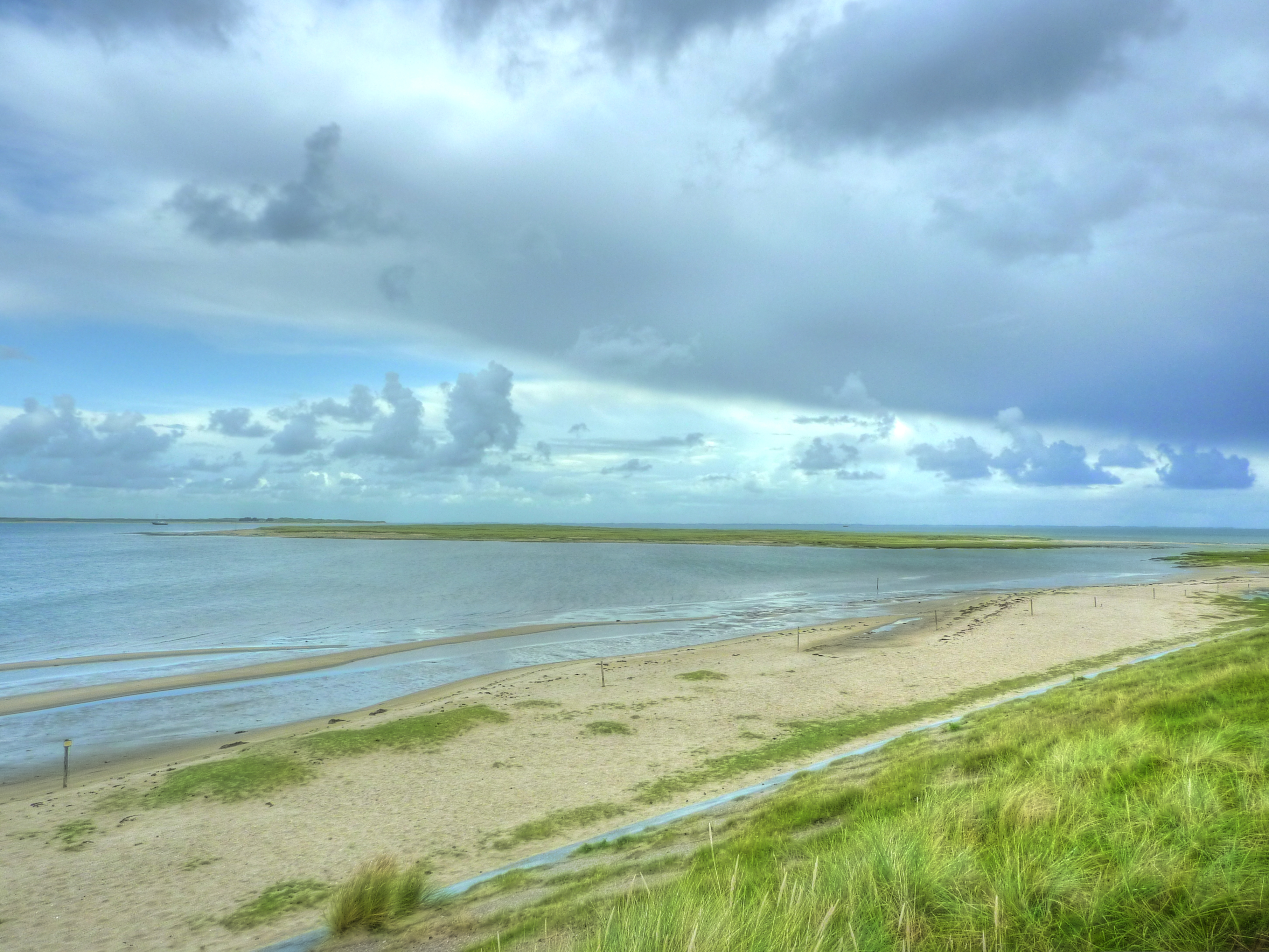 Insel Uthörn bei Sylt